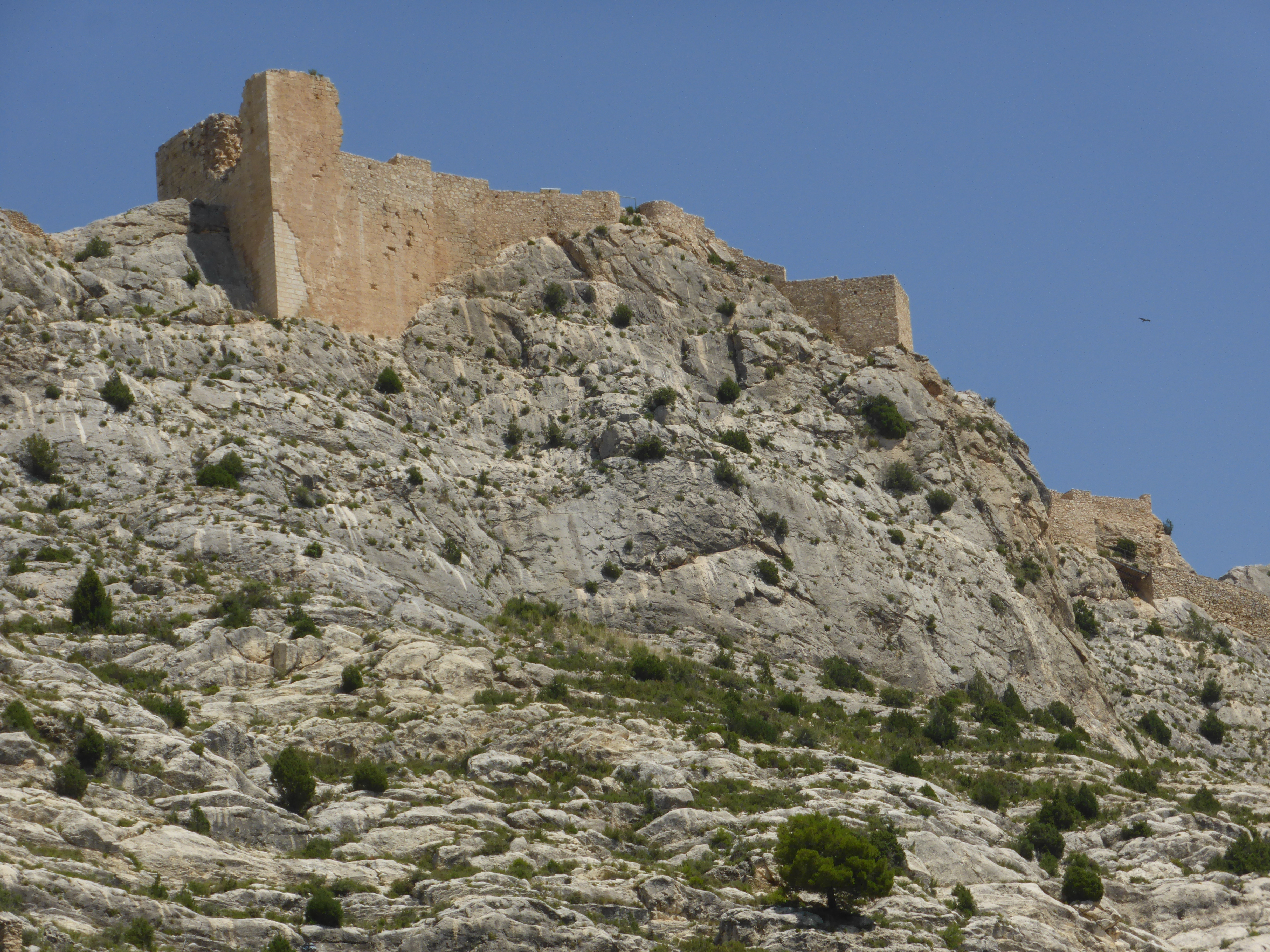 El castillo está restaurado, pues fue muy dañado en las Guerras Carlistas del siglo XIX. Fue un castillo de la Orden del Temple (de los caballeros templarios). Tras la caída de los templarios, a principios del siglo XIV, pasó a la Orden de Malta.